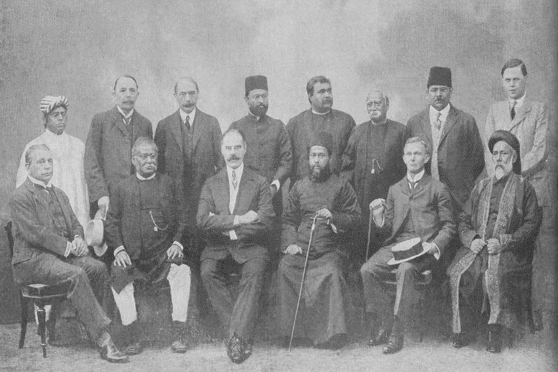 ঢাকা বিশ্ববিদ্যালয় কমিটি, ১৯২১। বাম থেকে ডানে উপবিষ্ট: মি. জি. ডব্লু কোচলার, ডক্টর রাসবিহারী ঘোষ, মি. আর নাথান, নওয়াব সিরাজুল ইসলাম। বাম থেকে ডানে দন্ডায়মান: ডক্টর এস সি বিদ্যাভূষণ, মিস্টার সি ডব্লু পিক, মি. ডব্লু এ জে ওর্চয়োল্ড, সামসুল ওলেমান এন এ ওয়াহেদ, বাবু লোহিত মোহন চ্যাটার্জী, বাবু আনন্দচন্দ্র রায়, মাওলানা মোহাম্মদ আলী, মি. ডি এস ফ্রেসার।